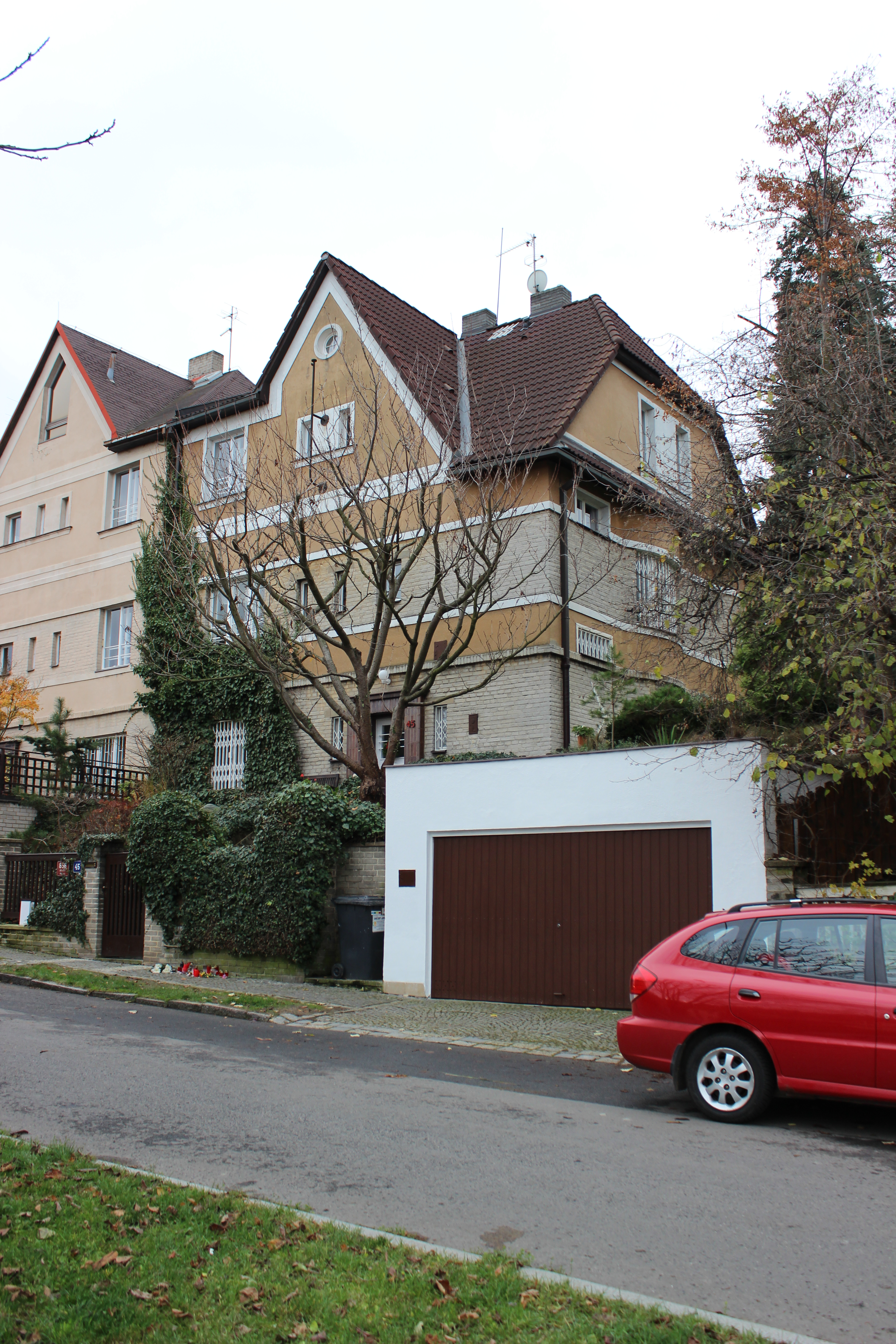 Dům Pavla Bobka v pražském Břevnově (pohled ze severu).